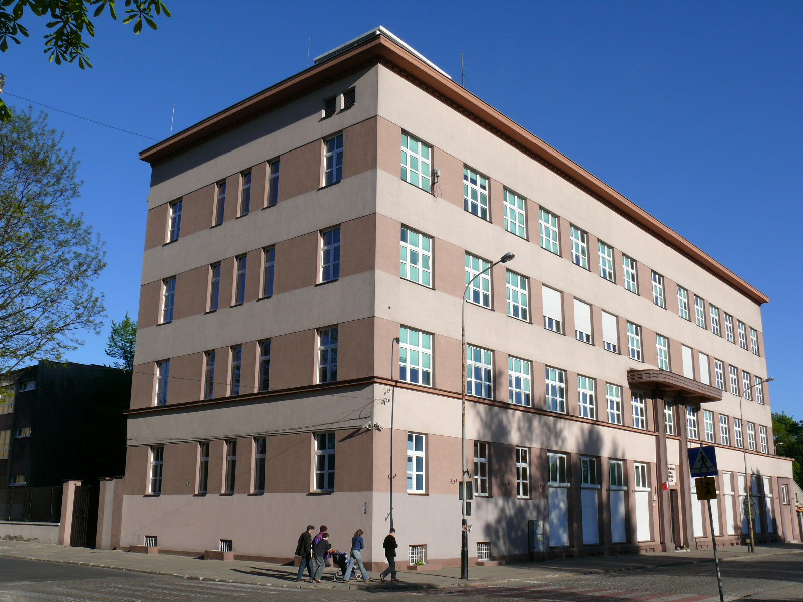 Wojewódzka Stacja Sanitarno-Epidemiologiczna ul. Wodna 40 w Łodzi